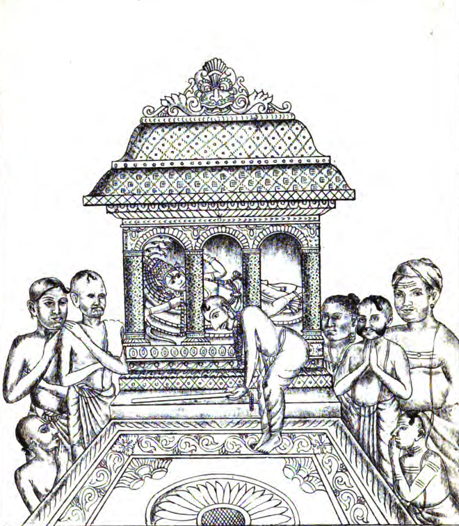 Marthanda Vurmah Maha Rajah Making Over The Kingdom To Padmanabha Swamy